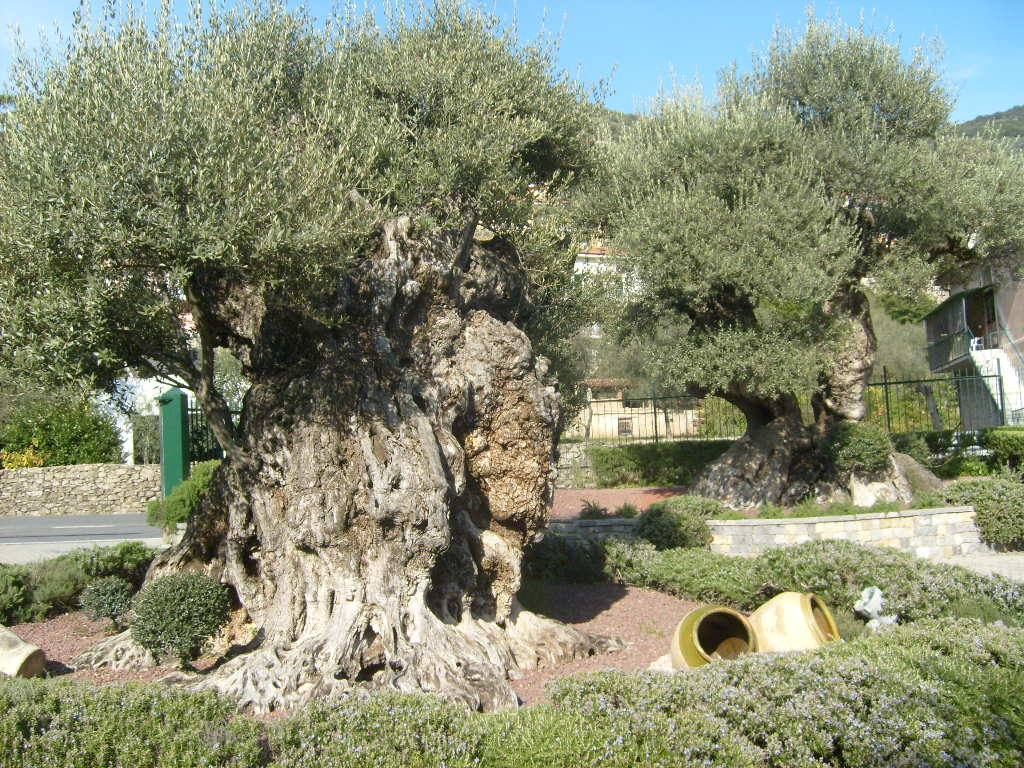 Boom van meer dan 1000 jaar oud bij het Olijvenmuseum Isnardi.